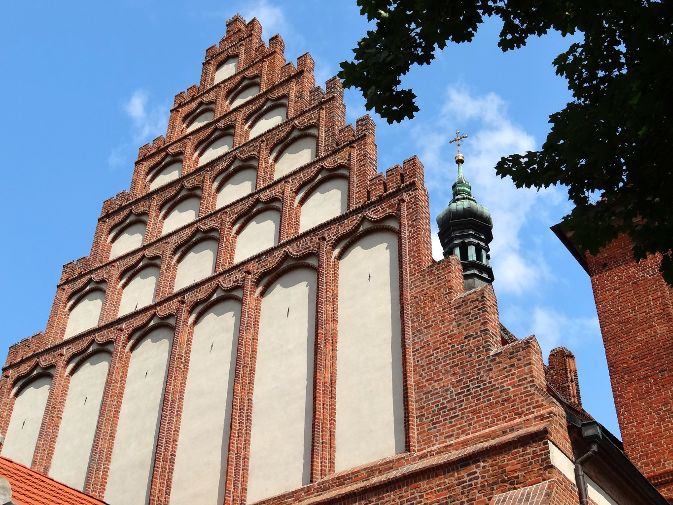 Katedra p.w. św. Marcina i Mikołaja w Bydgoszczy (XIV-XV wiek)